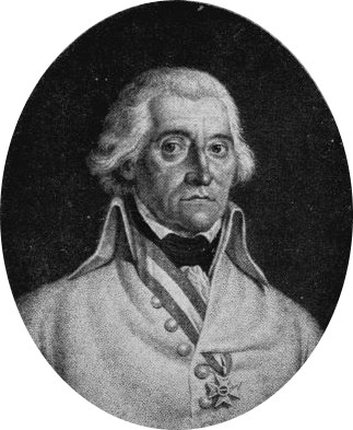 Friedrich von Hotze (1739-1799) austrian general